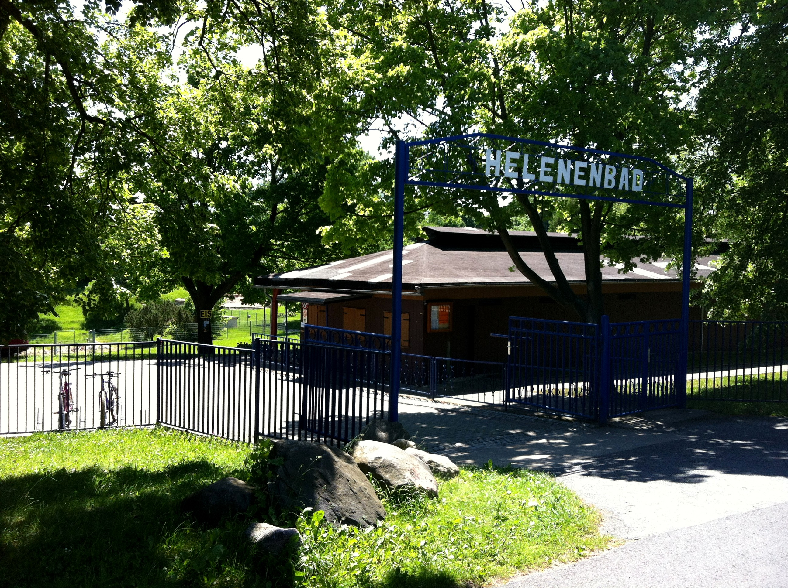 Eingang zum ehemaligen Helenenbad - seit 2007 Luftbad